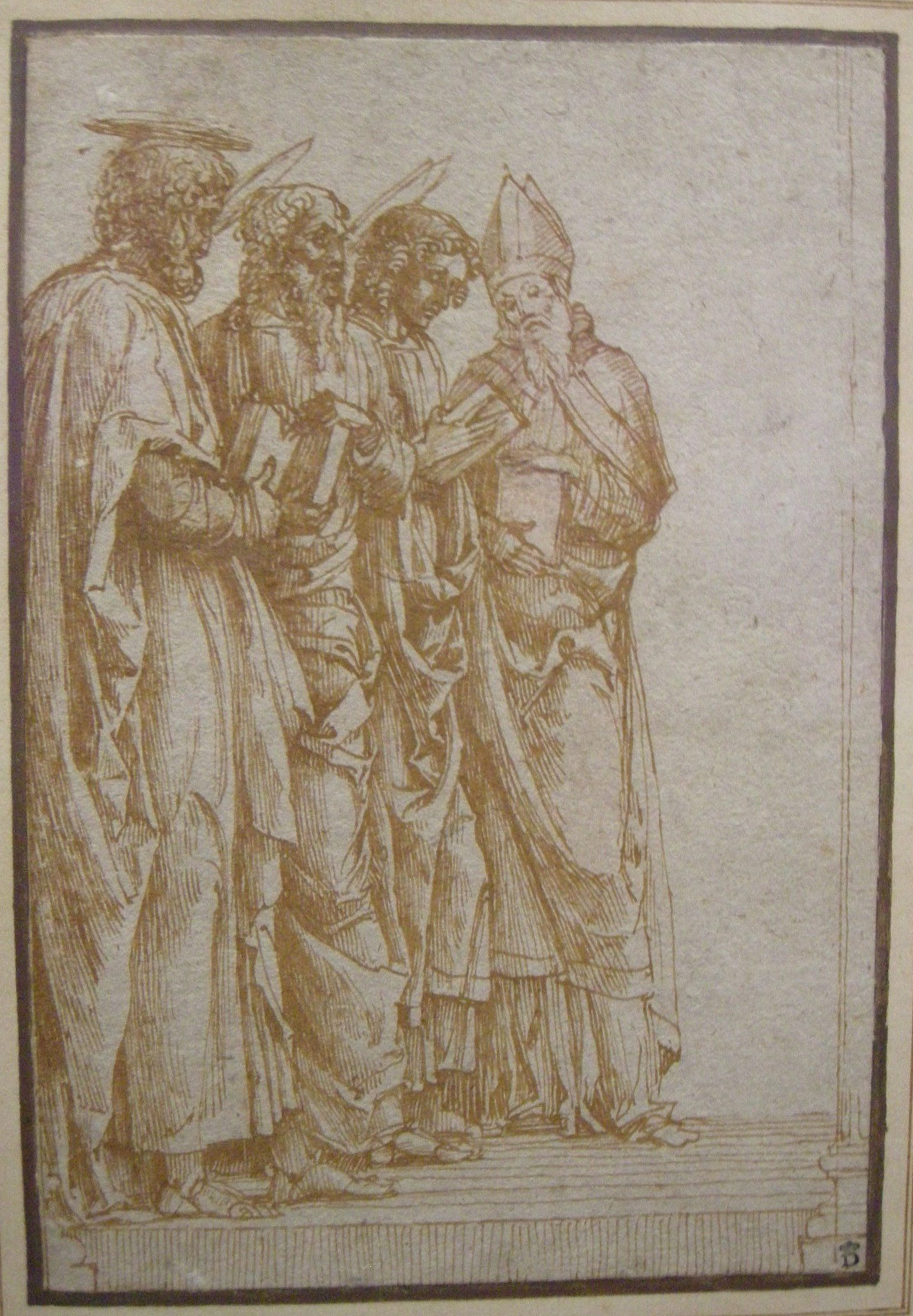 studio di quattro santo per la pala di san zeno